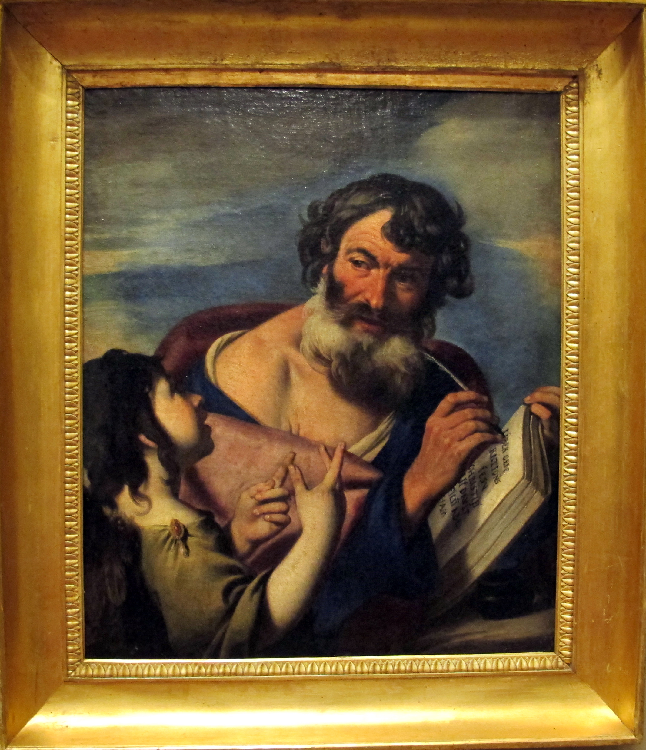 Galleria Napoletana (Museo di Capodimonte)